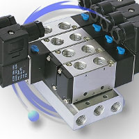 Zawory sterowane elektromagnetycznie PressMann ze strony